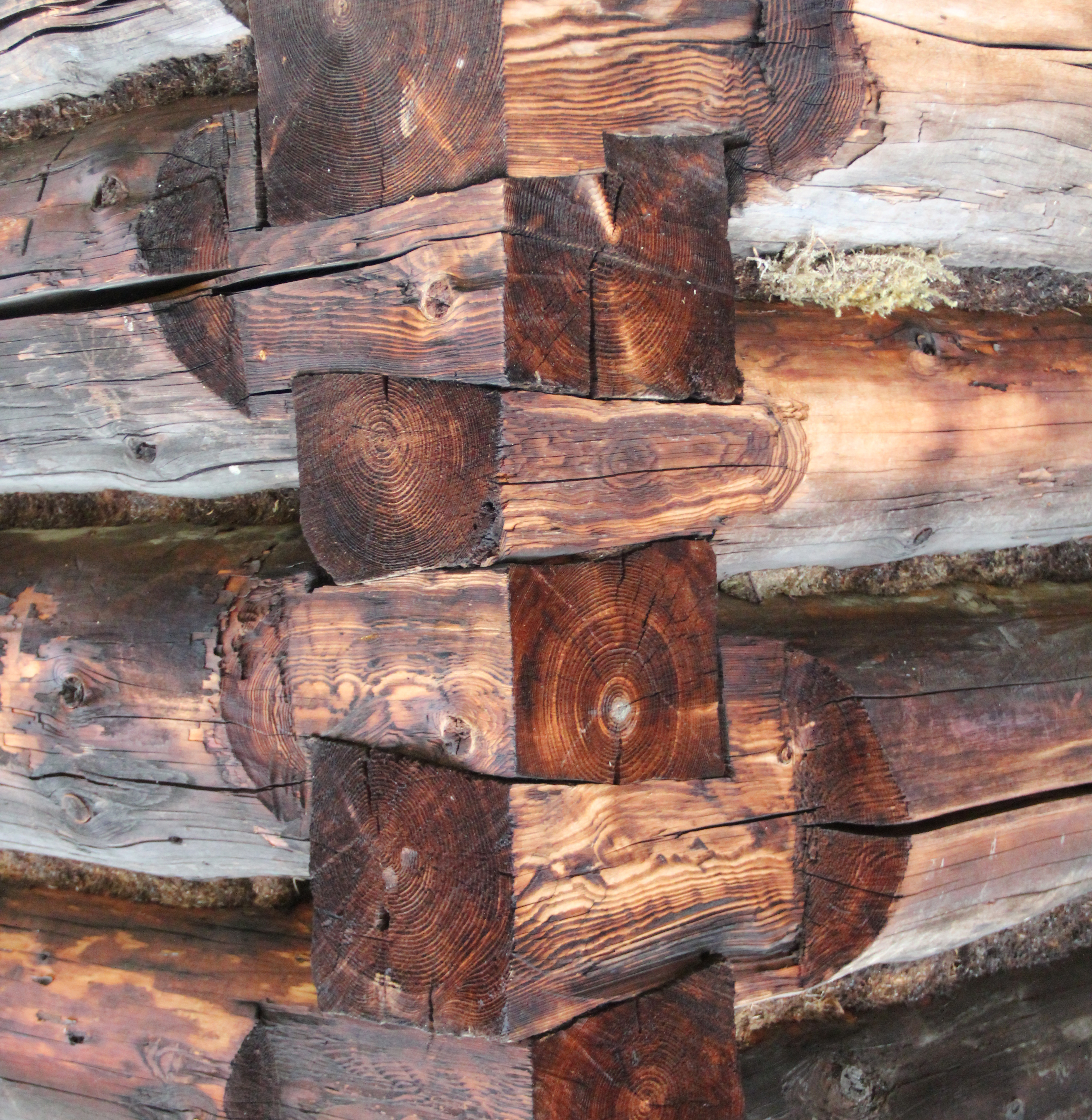 Zwaluwstaartverbinding bij traditionele Slowaakse blokhutbouwwijze